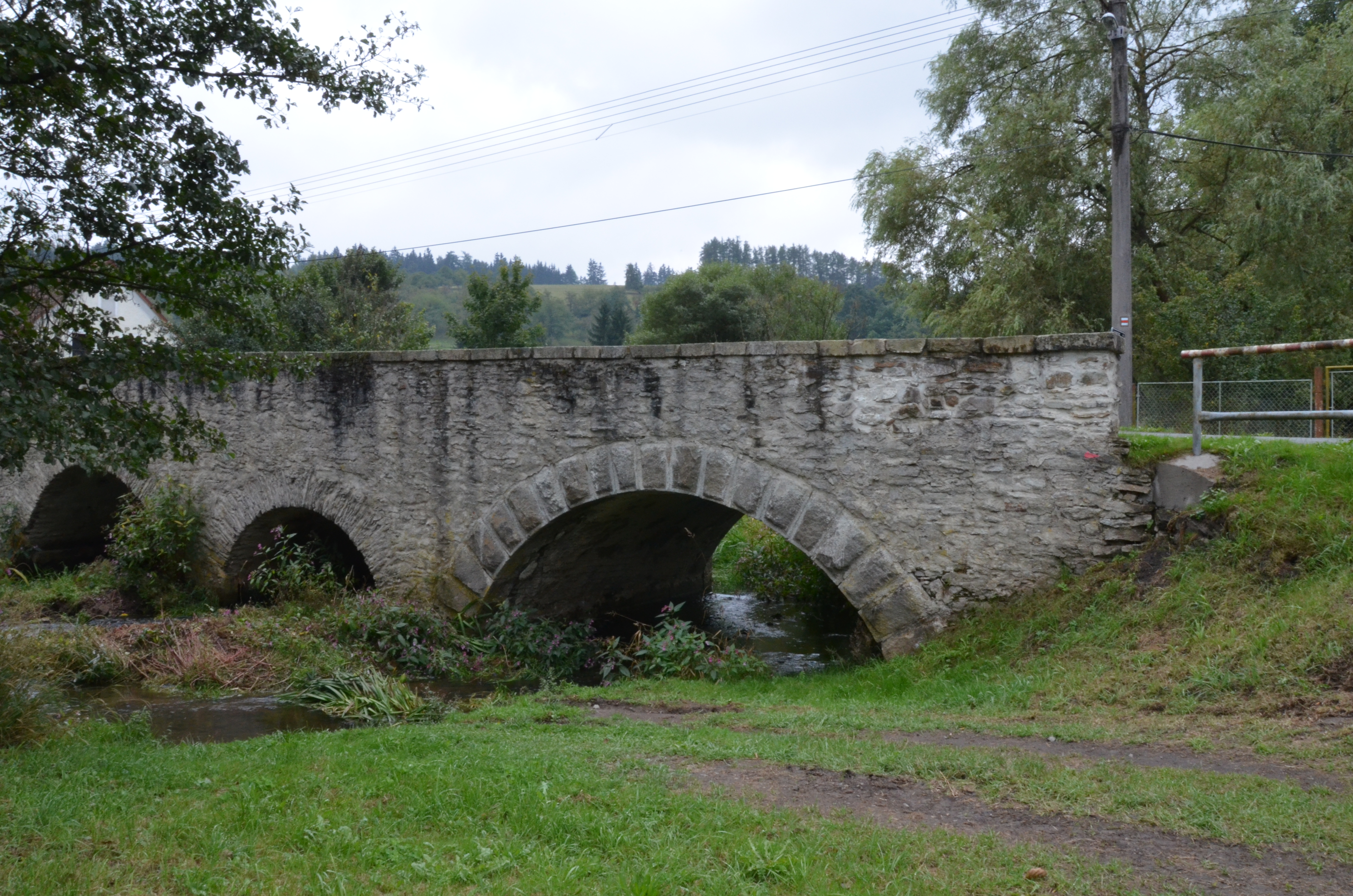 Most v Dolním Kramolíně přes Kosí potok